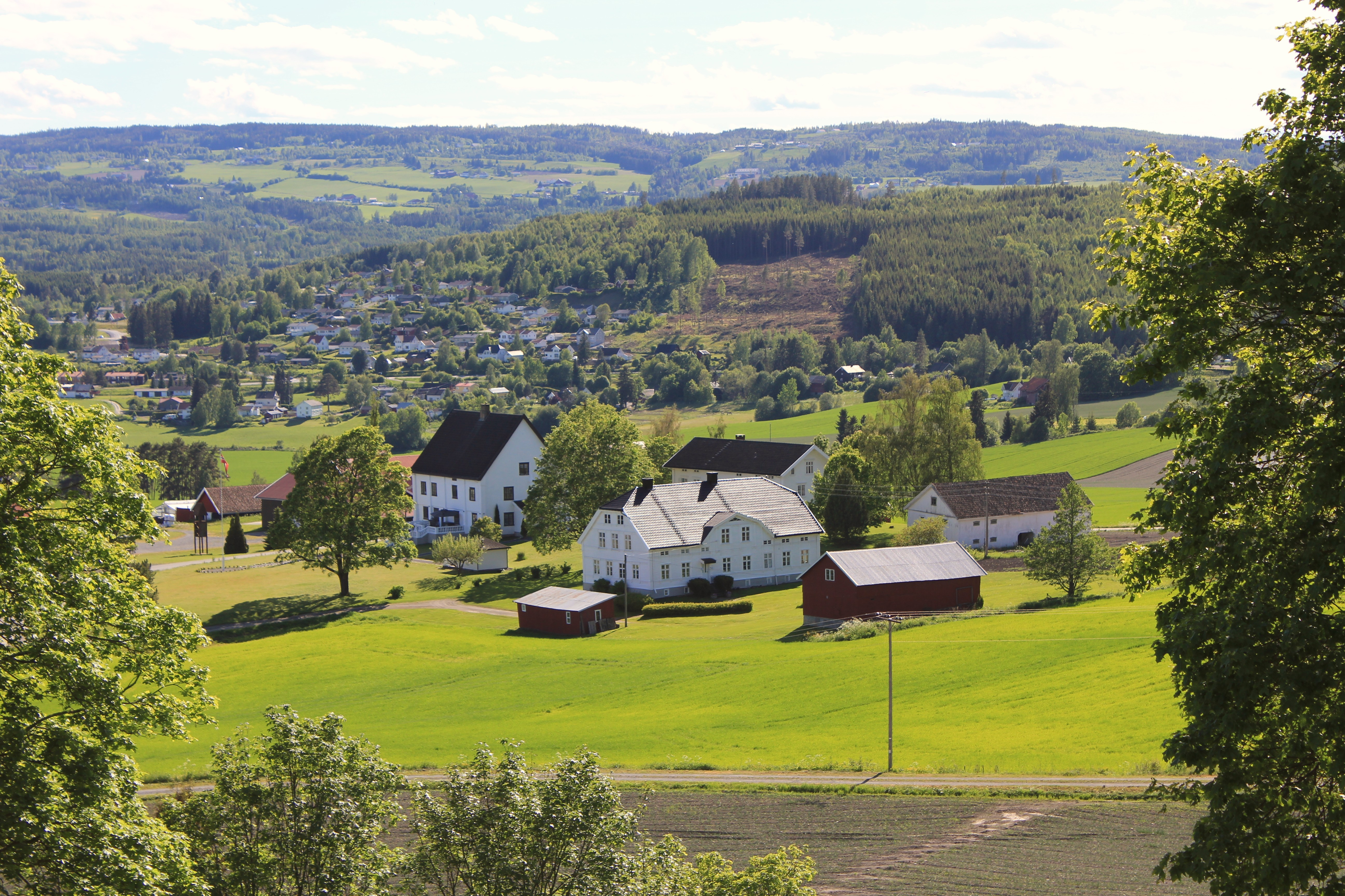 Mot Skreia, Østre Rognstad sett fra Balke